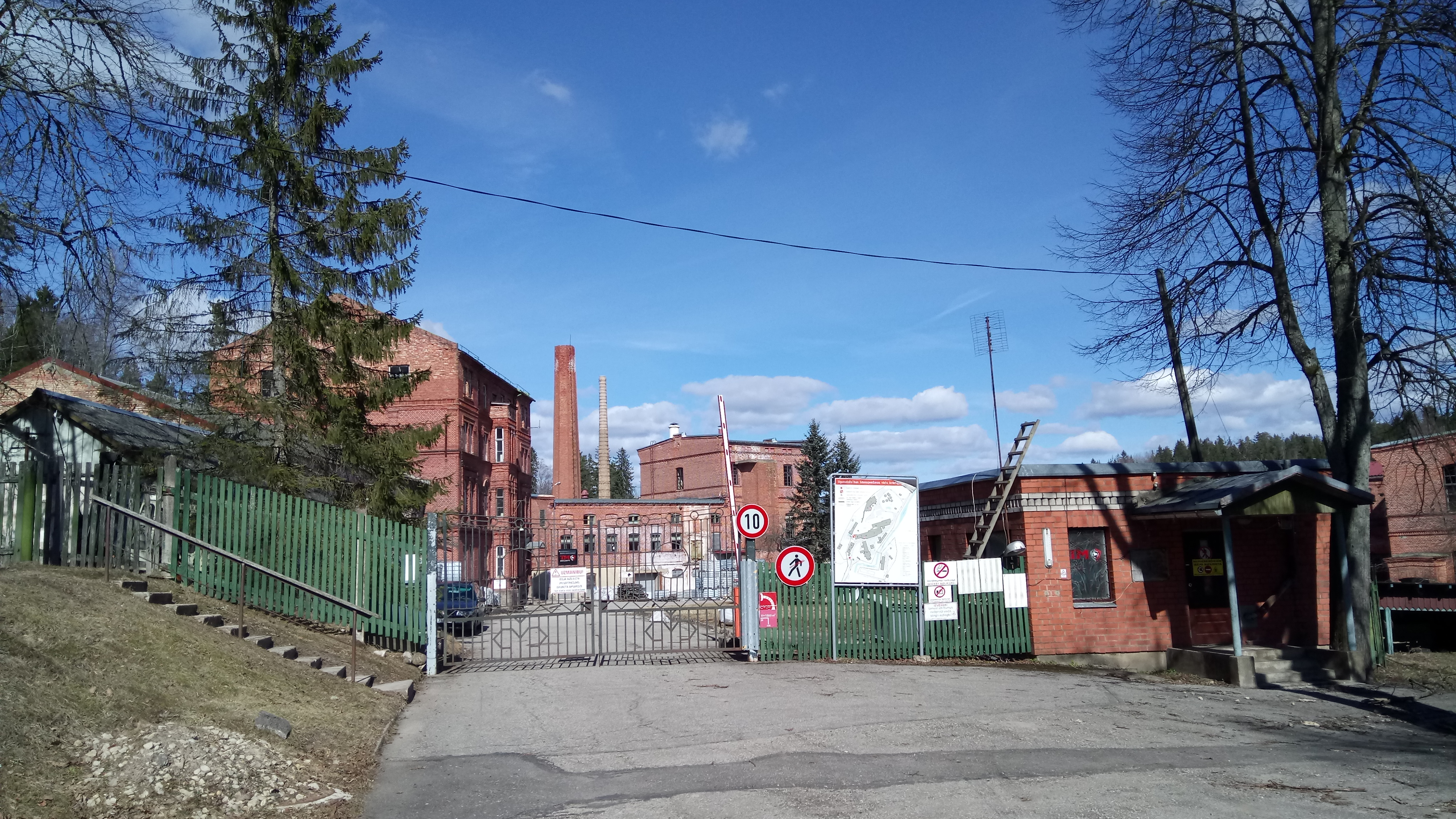 Līgatnes papīrfabrika mūsdienās